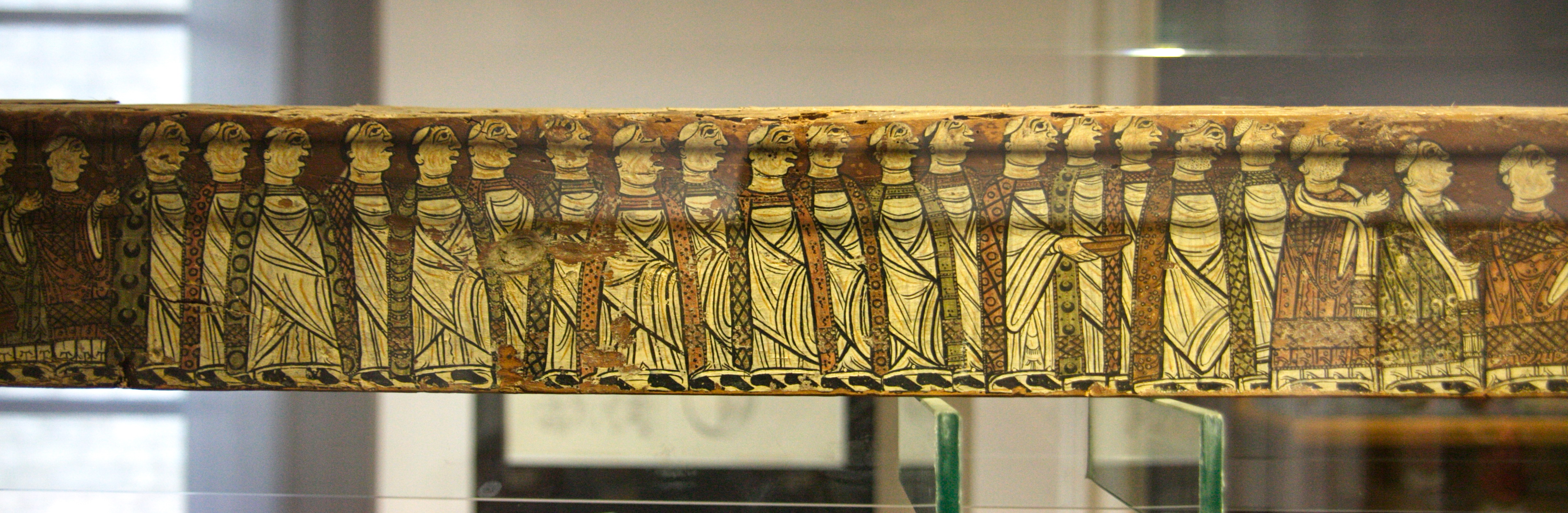 Biga de Cruïlles. Biga romànica procedent del Monestir de Sant Miquel de Cruïlles (Baix Empordà, Catalunya) i actualment al Museu d'Art de Girona. Fa 370 cm de llargada, és de secció rectangular, de 13,5 cm per 9 cm i pintada al tremp. Se la considera obra d'inicis del segle XIII.